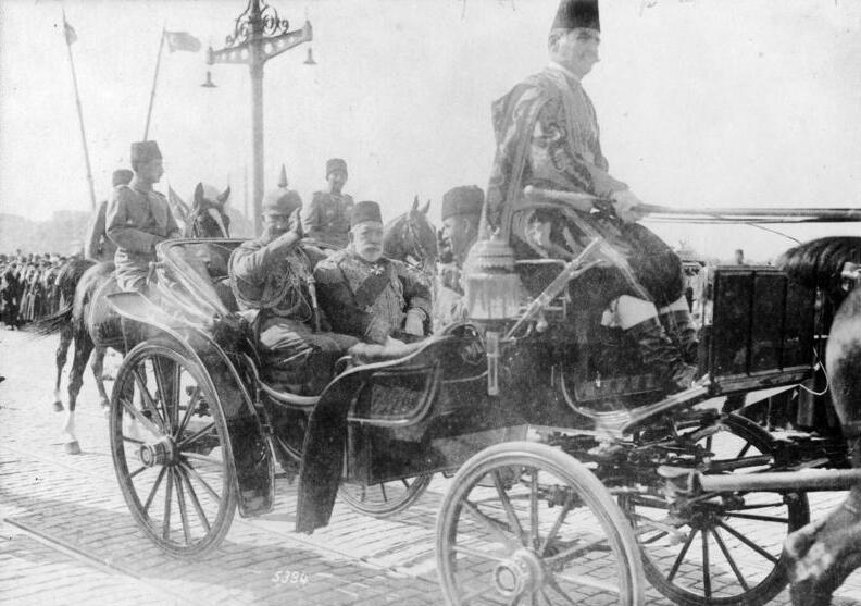 Kaisertage in Konstantinopel, 1917. Der Einzug des Kaisers über die Perabrücke: Der Kaiser, der Sultan, Exz. Enver Pascha. Konstantinopel, Oktober 1917 Filmtrupp Nr. 4 / Bild- und Filmamt (BUFA - Nr. 5394 )